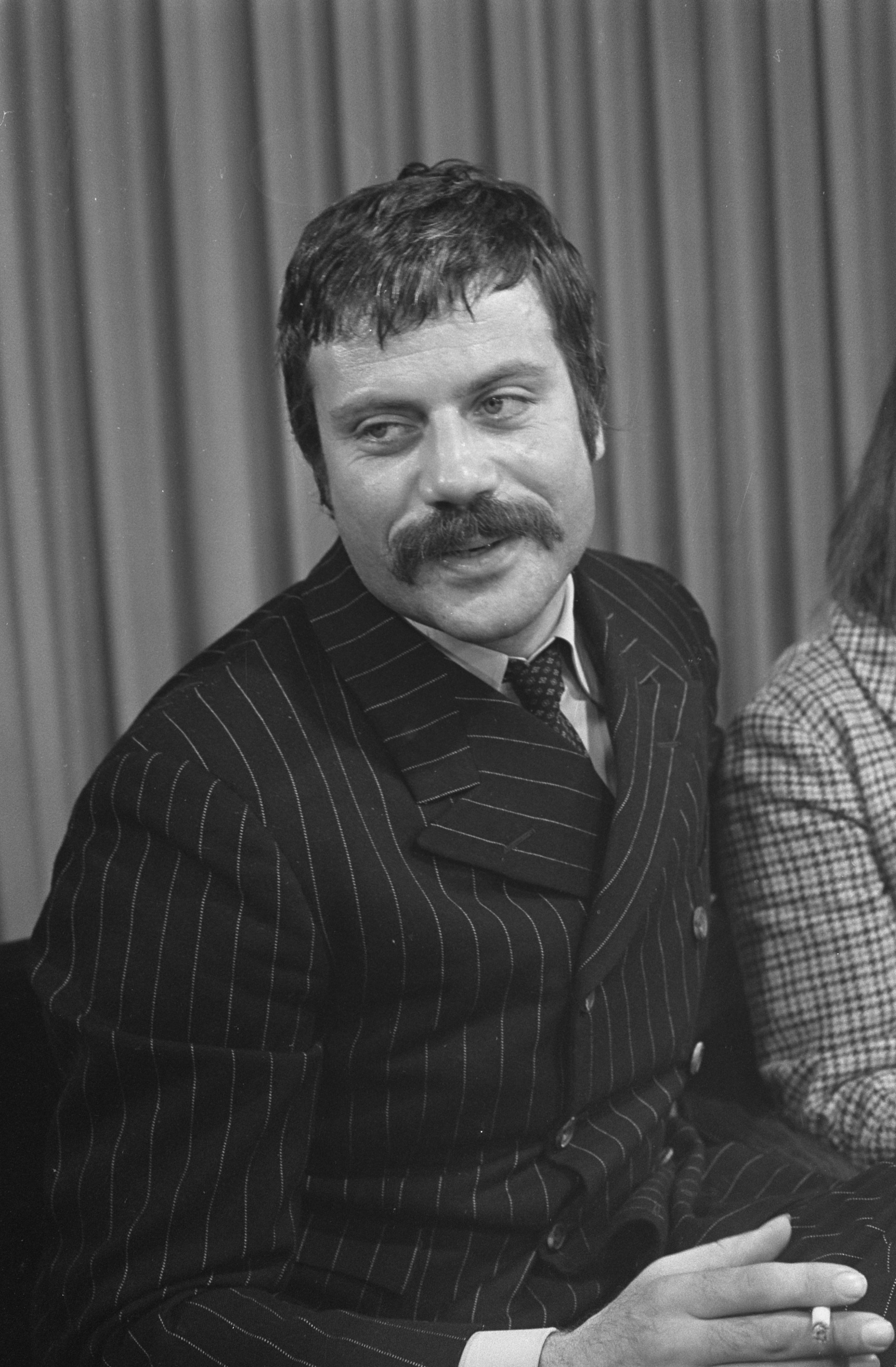 Filmacteur Oliver Reed met echtgenote op Schiphol